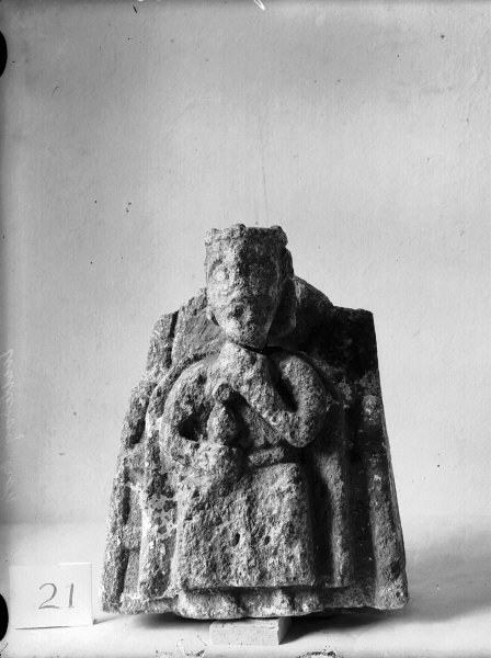 Skulptur framställande kung Rone. I Uddevalla Museum. Kategori: (05) SkulpturerSkulptur framställande kung Rone. I Uddevalla Museum.